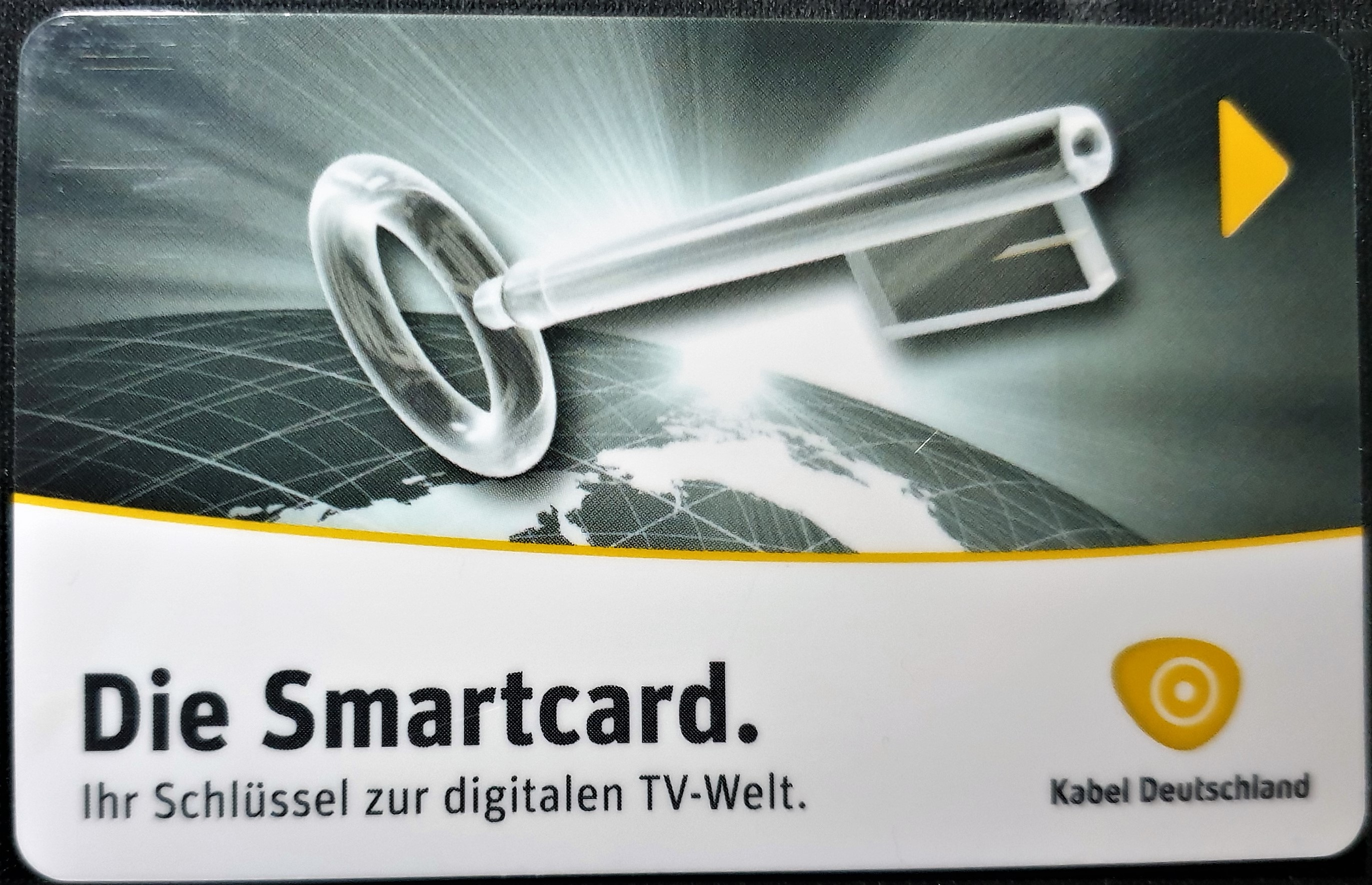 Kabel Deutschland Smartcard Typ G09 für CI+ Modul der NDS GmbH aus dem Jahr 2012 (Vorderseite)